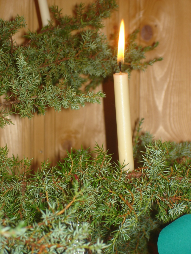 Juletre laga av staur og einerkvist.